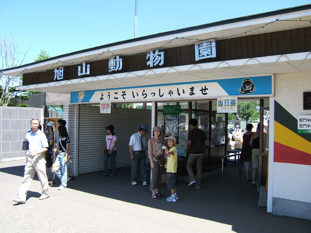 Asahiyama zoo. Asahikawa city, Hokkaido, Japan